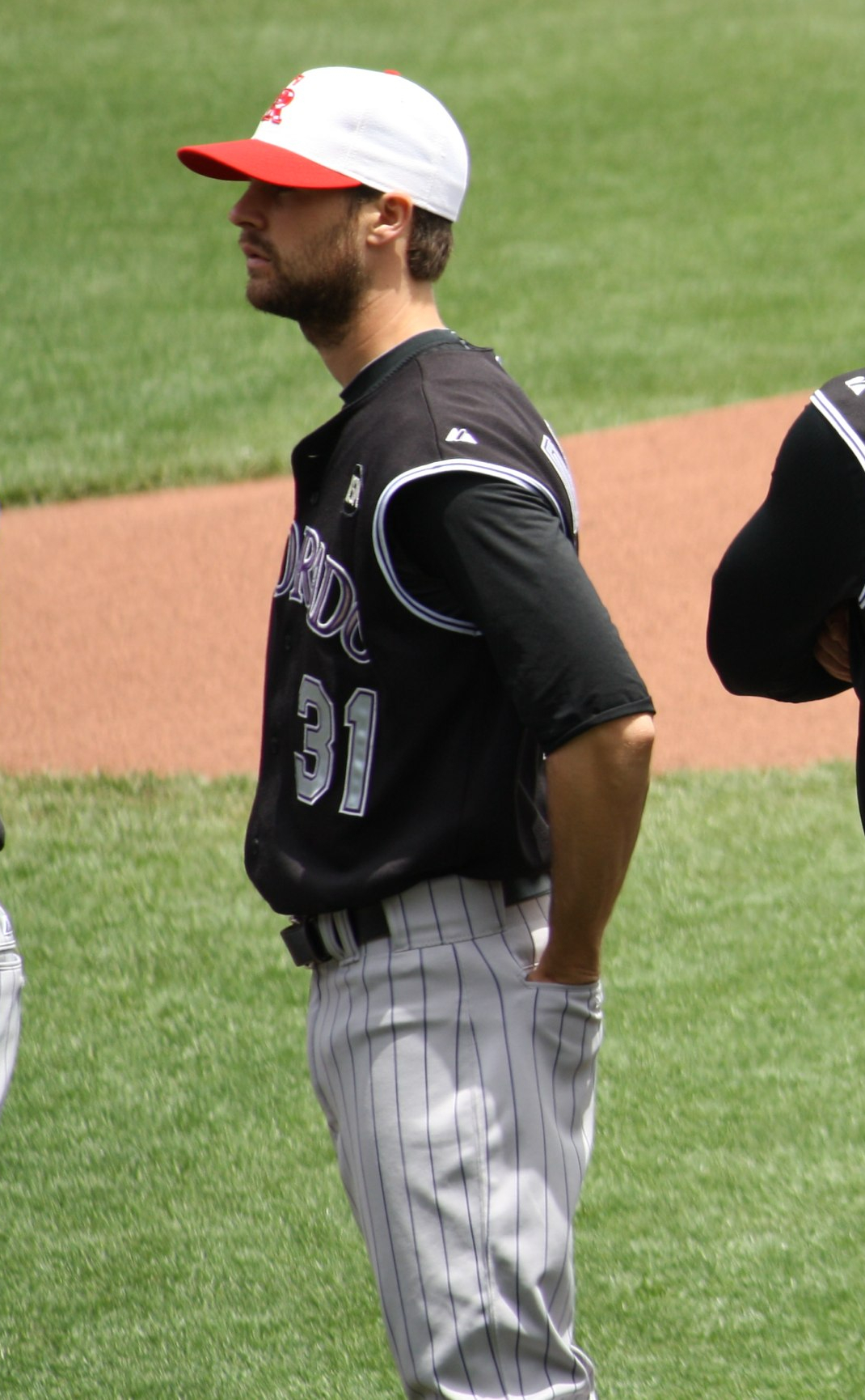 Matt Daley